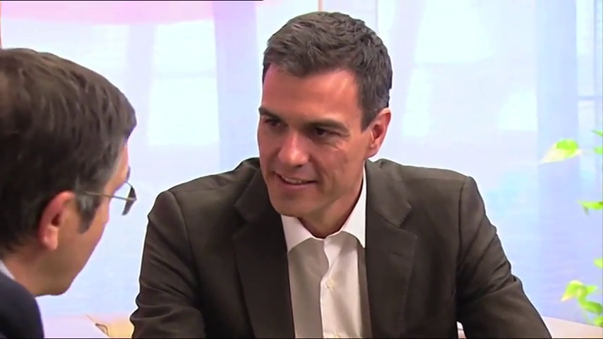 Encuentro entre Patxi López y Pedro Sánchez